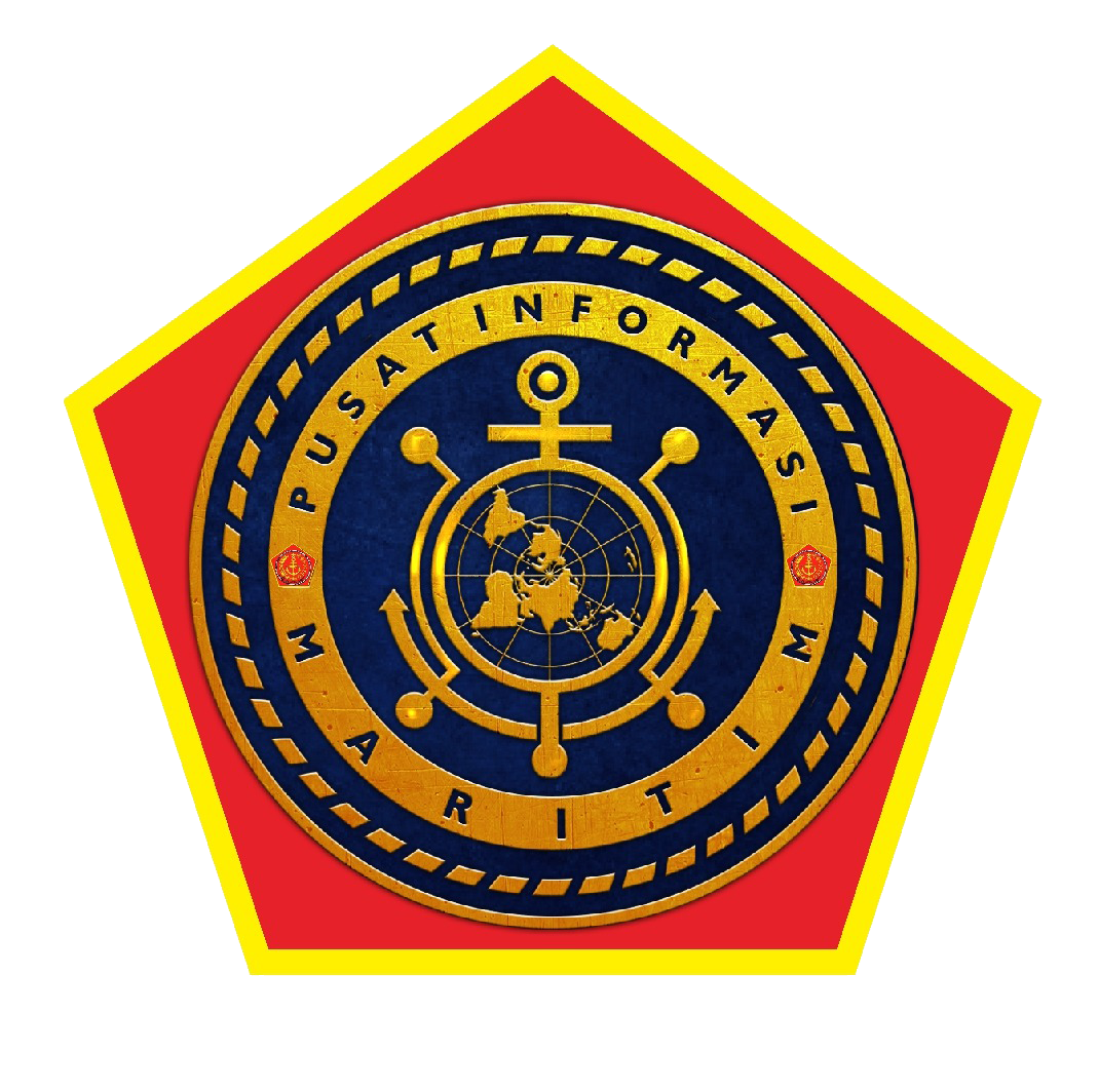 Logo Satuan Pusat Informasi Maritim Tentara Nasional Indonesia